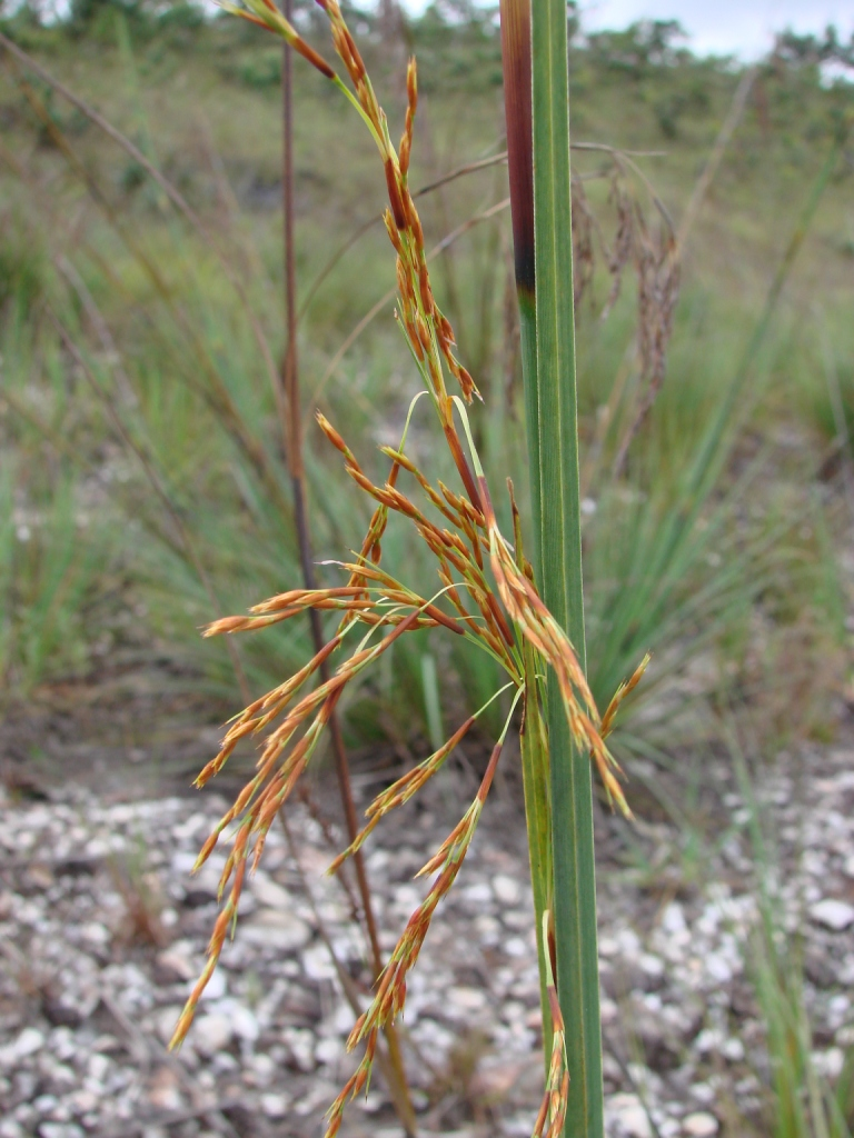 Lagenocarpus rigidus - CYPERACEAE Parque Estadual da Serra dos Pirineus - Pirenópolis - Goiás - Brasil.